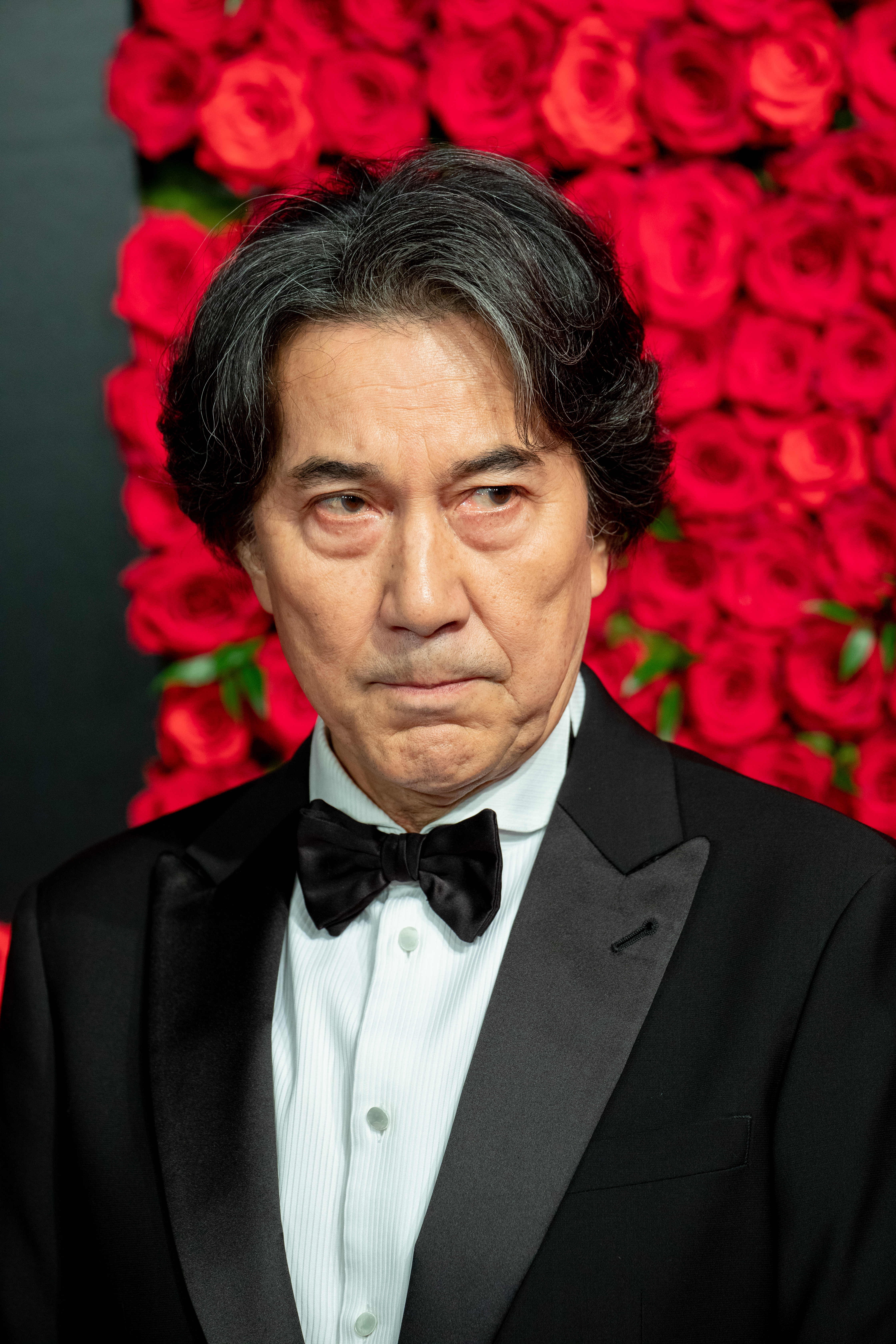 第30回 東京国際映画祭 オープニングセレモニー 役所広司 (映画俳優 役所広司)